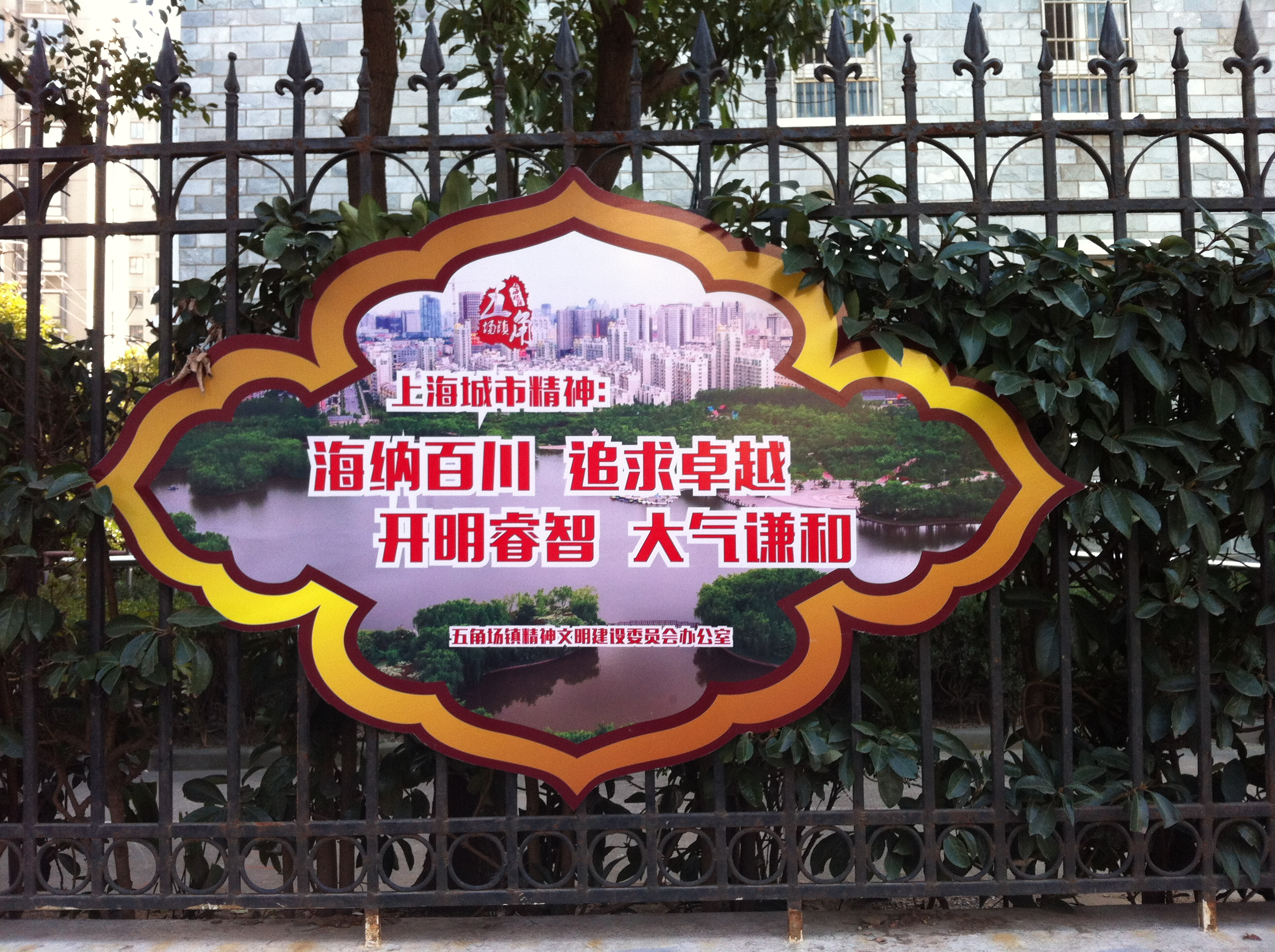 上海杨浦区一小区外的“上海城市精神”标语。